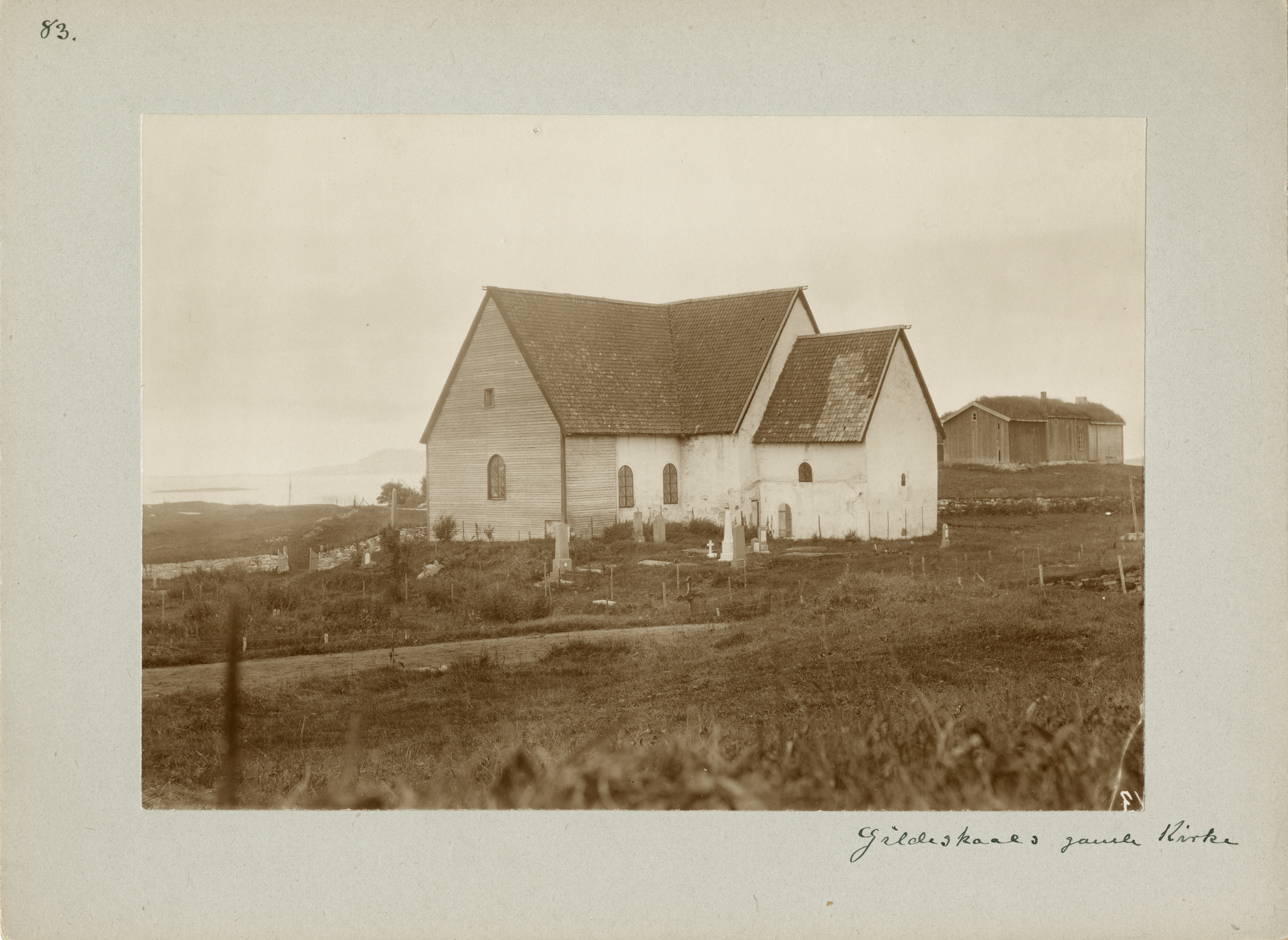 Gildeskål gamle kirke i Gildeskål, Nordland